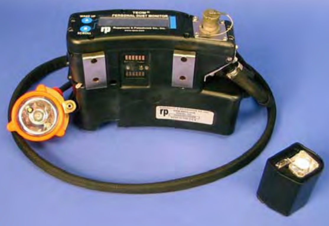 Изображение персонального пылемера, который выдаёт результат измерения концентрации пыли в реальном масштабе времени. Source: Fig. 3a in EVALUATION OF THE WET HEAD CONTINUOUS MINER TO REDUCE RESPIRABLE DUST